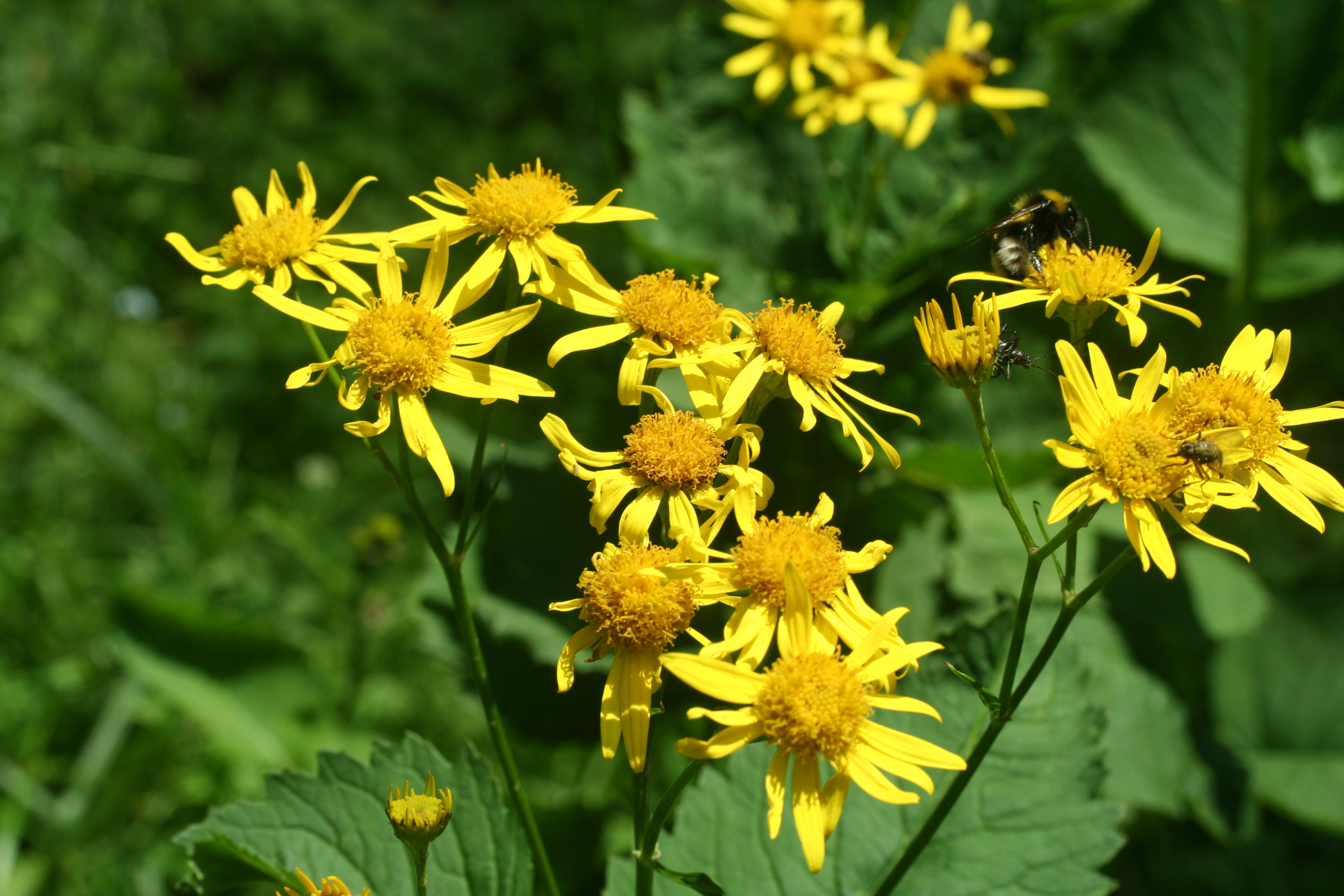 Senecione alpino - Località: Pian Cansiglio, Tambre d'Alpago (BL), 1000 m s.l.m.